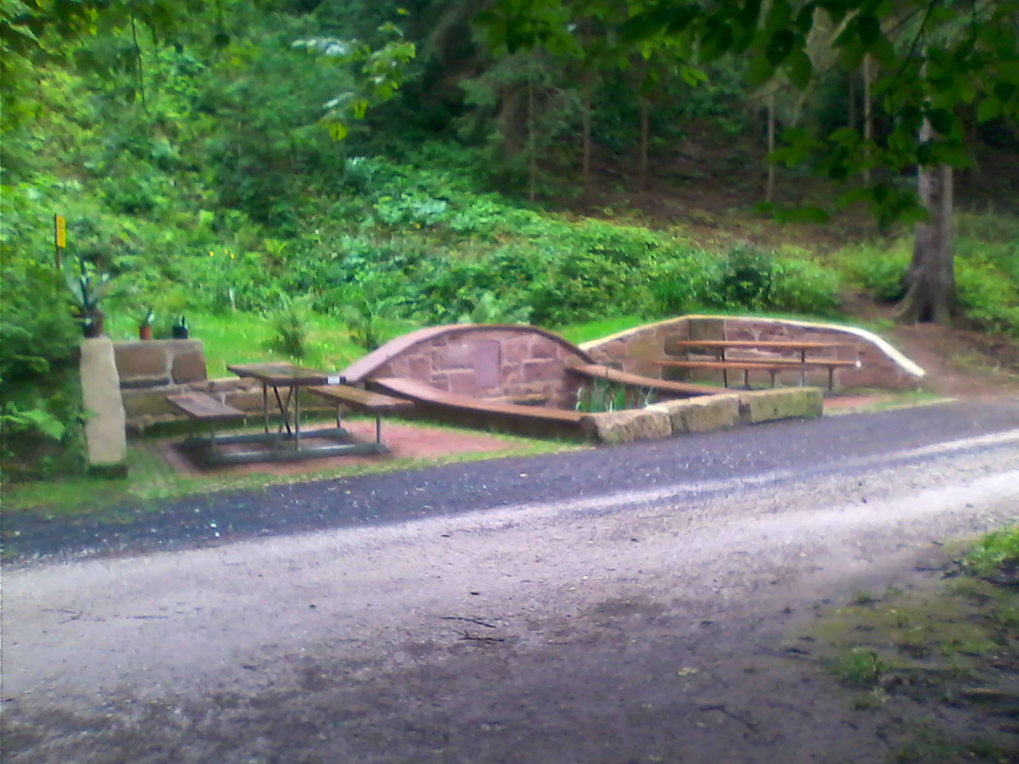 Klingenberg-Quelle: Blick auf die Quelle aus Richtung Bilshausen